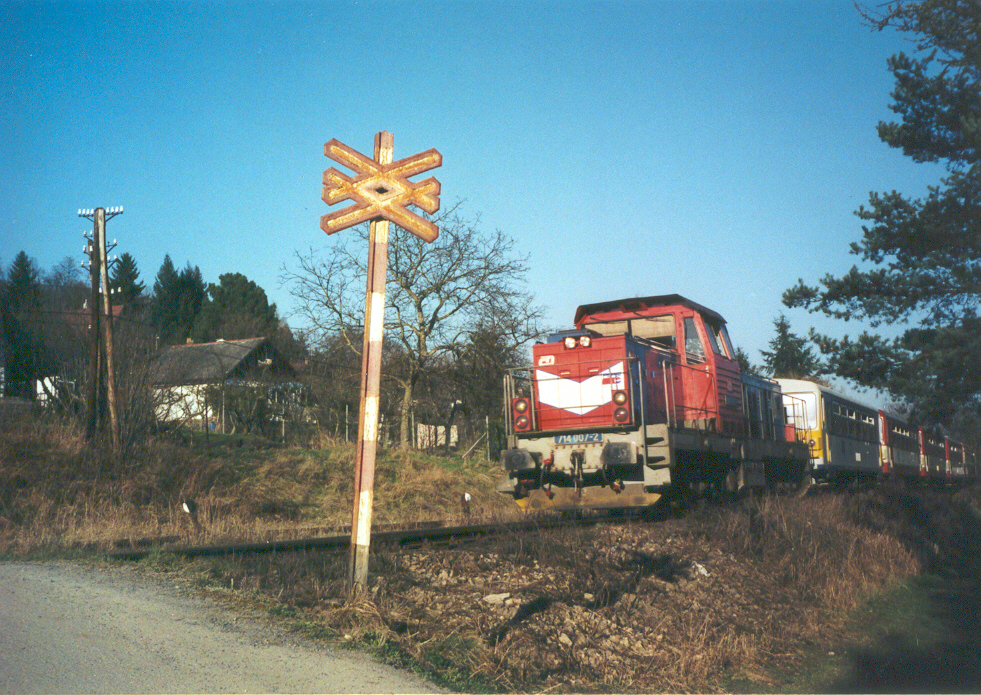 Luka pod Medníkem 2002